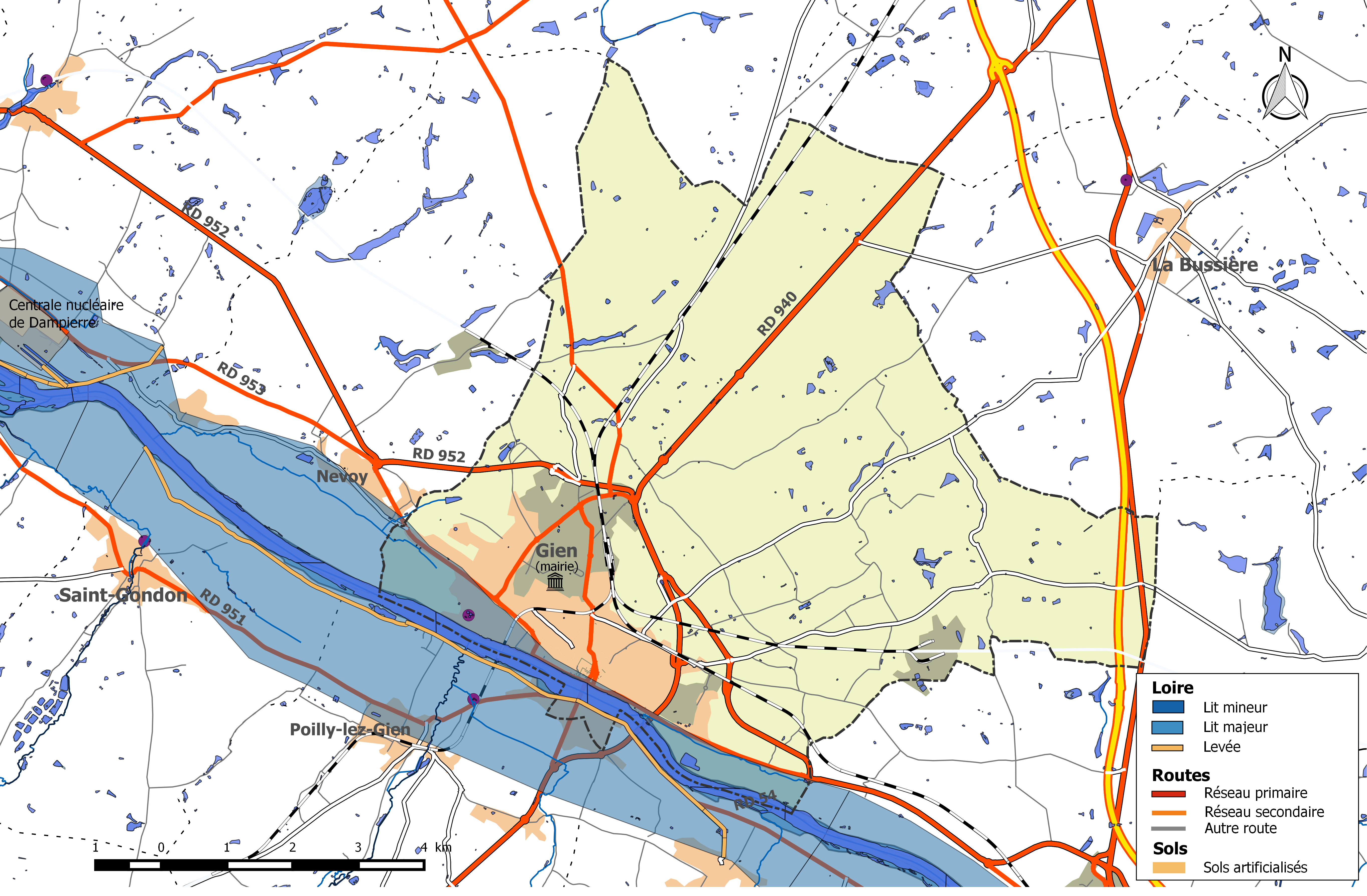 Zone inondable et réseaux hydrographique et routier de la commune de Gien